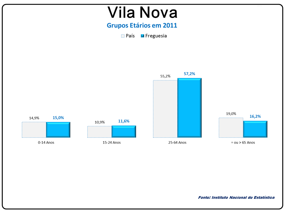 Freguesia